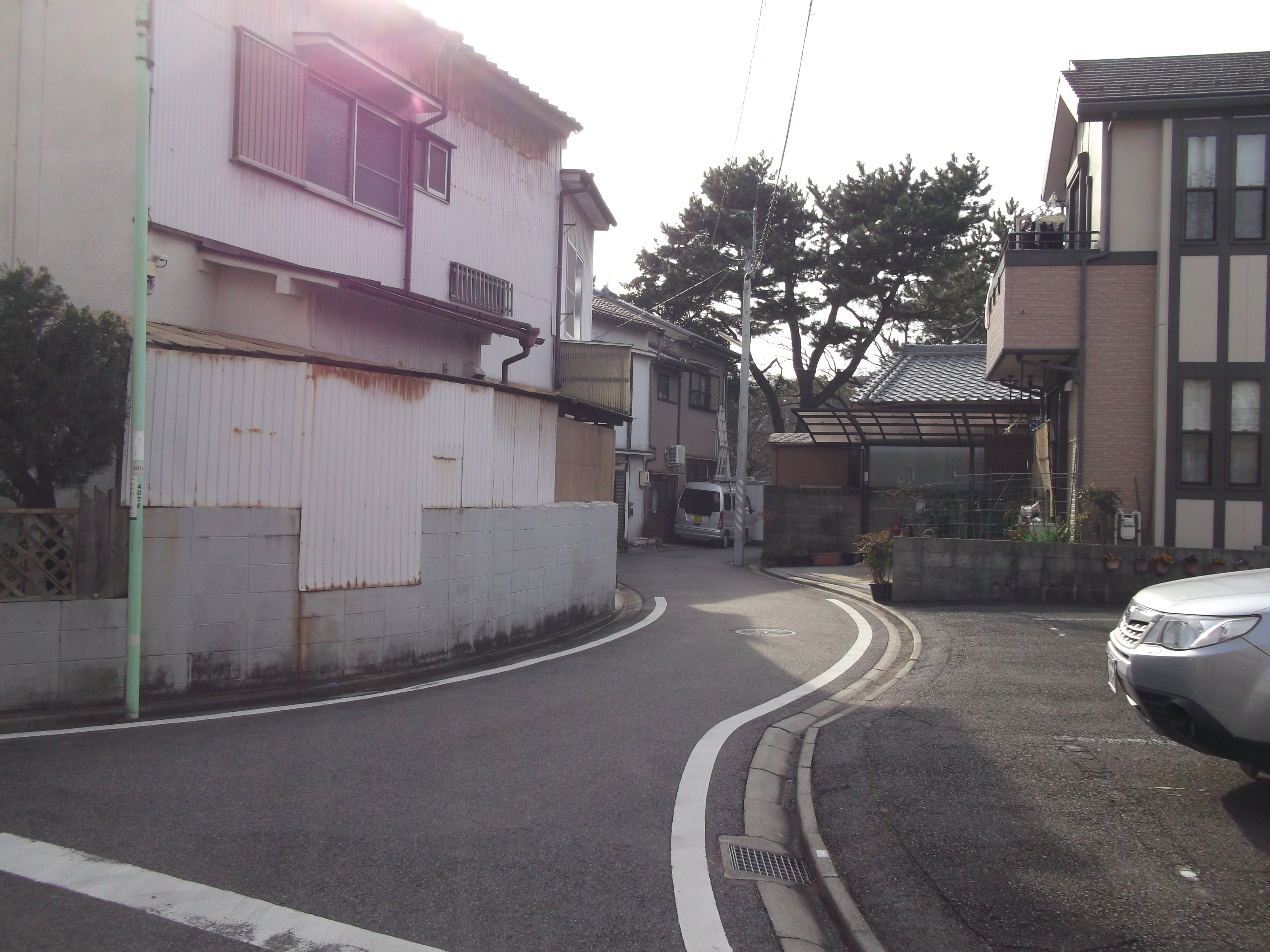 名古屋市北区平手町2丁目地内の街路の様子。隣接する志賀公園内の街路設計と共通するため、道路が曲がりくねっている。自動車のナンバープレート部分につき、画像修正済。